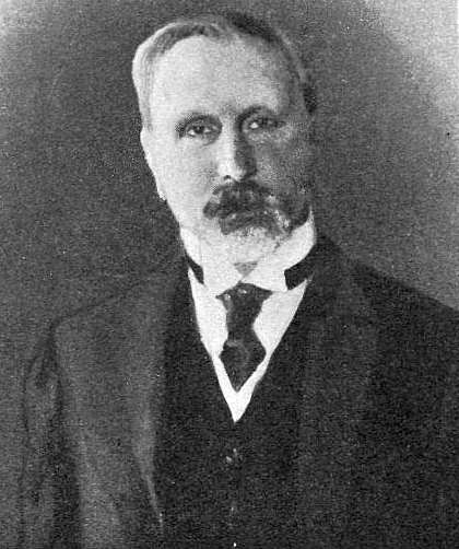 Кривошеин Александр Васильевич